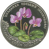 Цикламен коський реверс